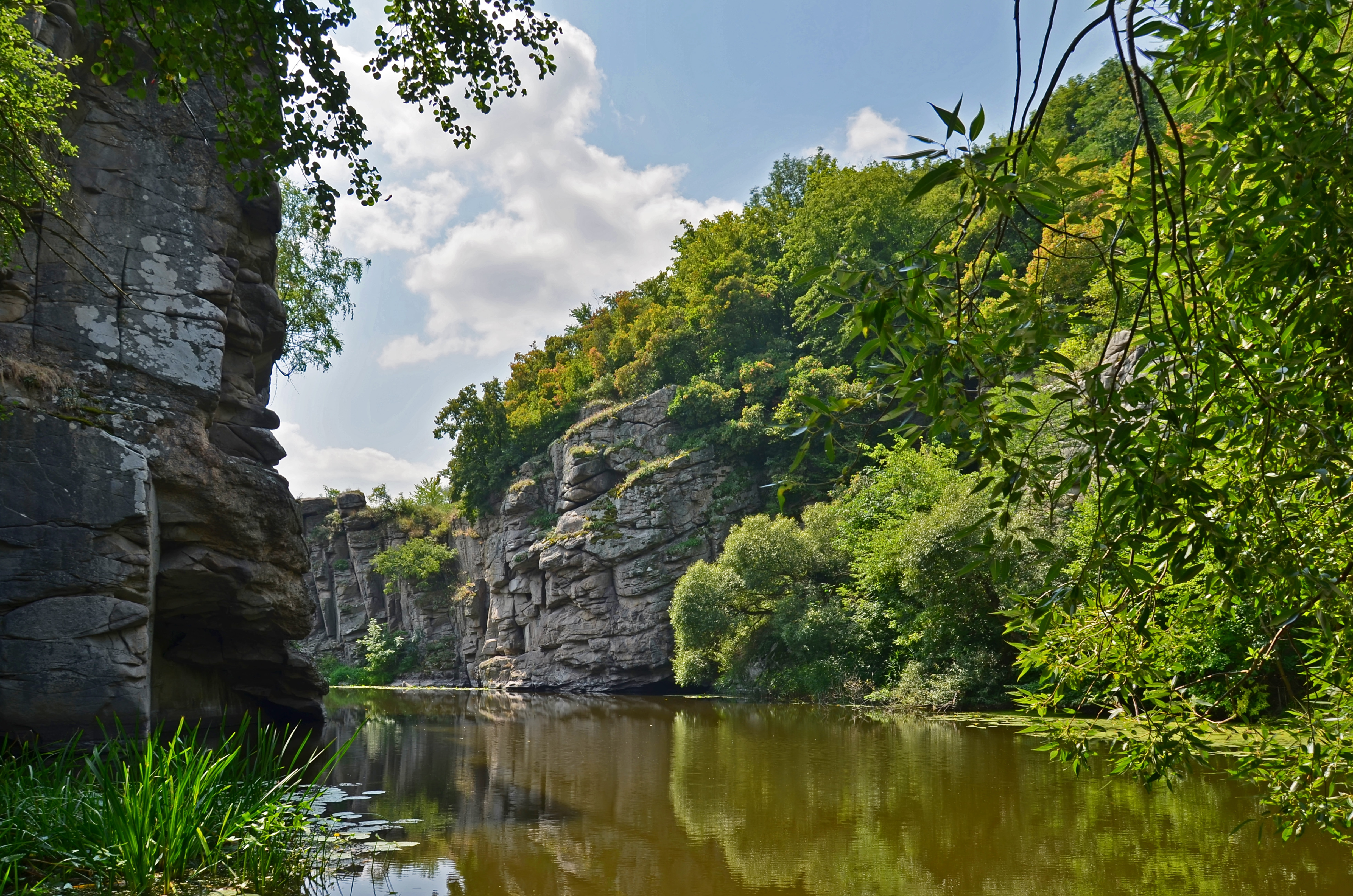 Буцький каньйон, Маньківський район, околиця смт. Буки на р. Гірський Тікич (800 м нижче греблі ГЕС)